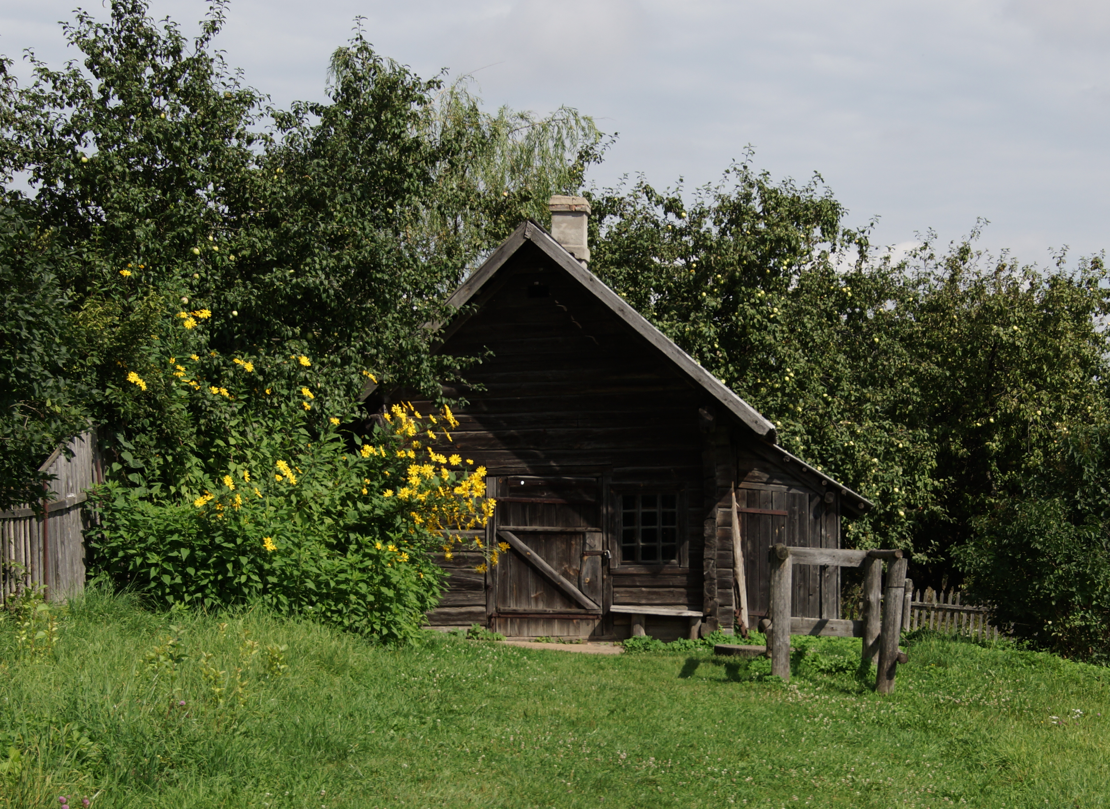 Беларуская (тарашкевіца): Музэефікаваныя аб’екты этнаграфічных комплексаў «Млын» і «Кузьня»:паравы млын дом завозьнікаў сьвіранкузьня. г. Заслаўе This is a photo of Belarusian heritage monument. Reference number: 612Г000334 ( WLM)